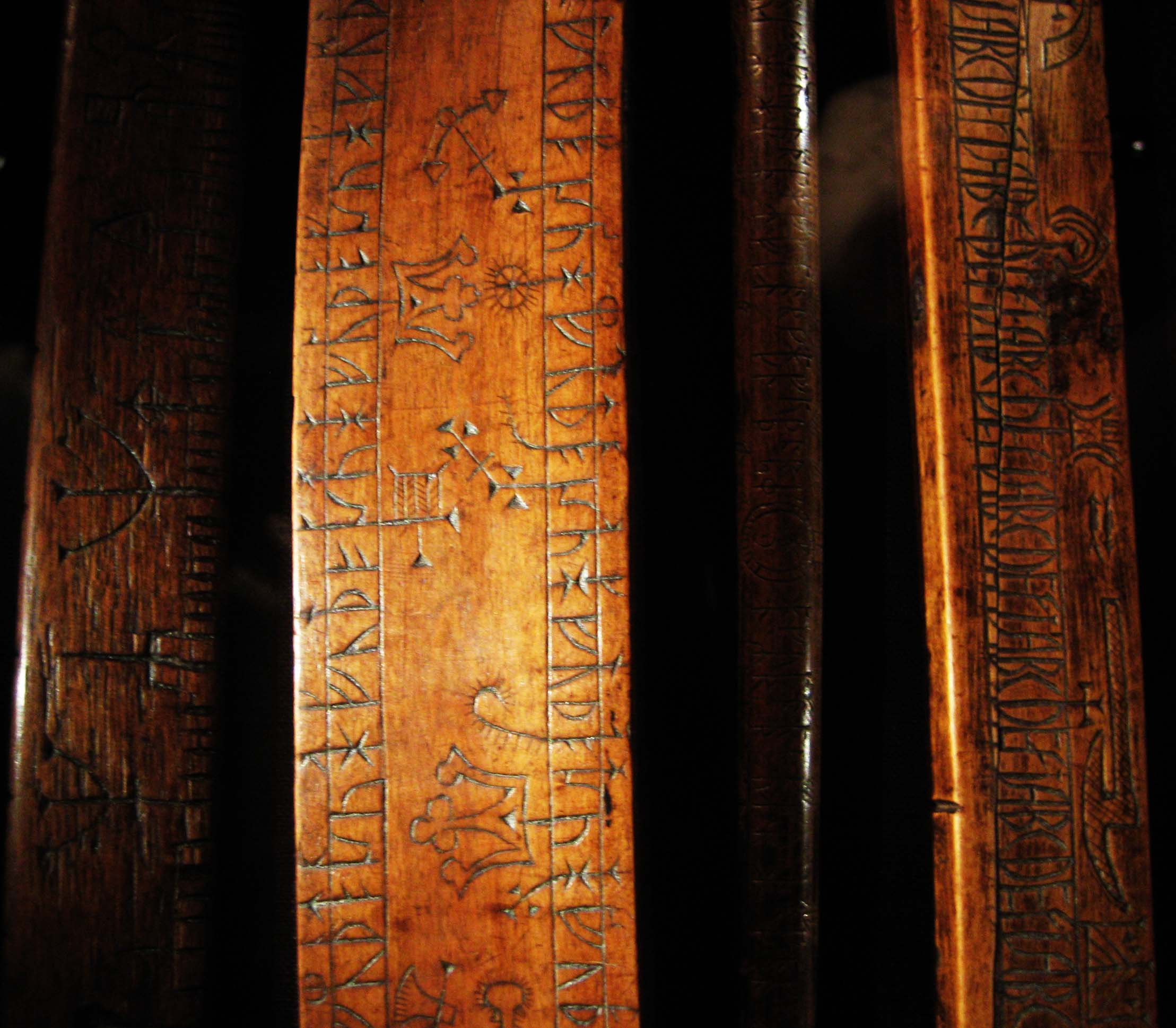 Runestaffs. Photo taken at the museum of history, Lund, Sweden.